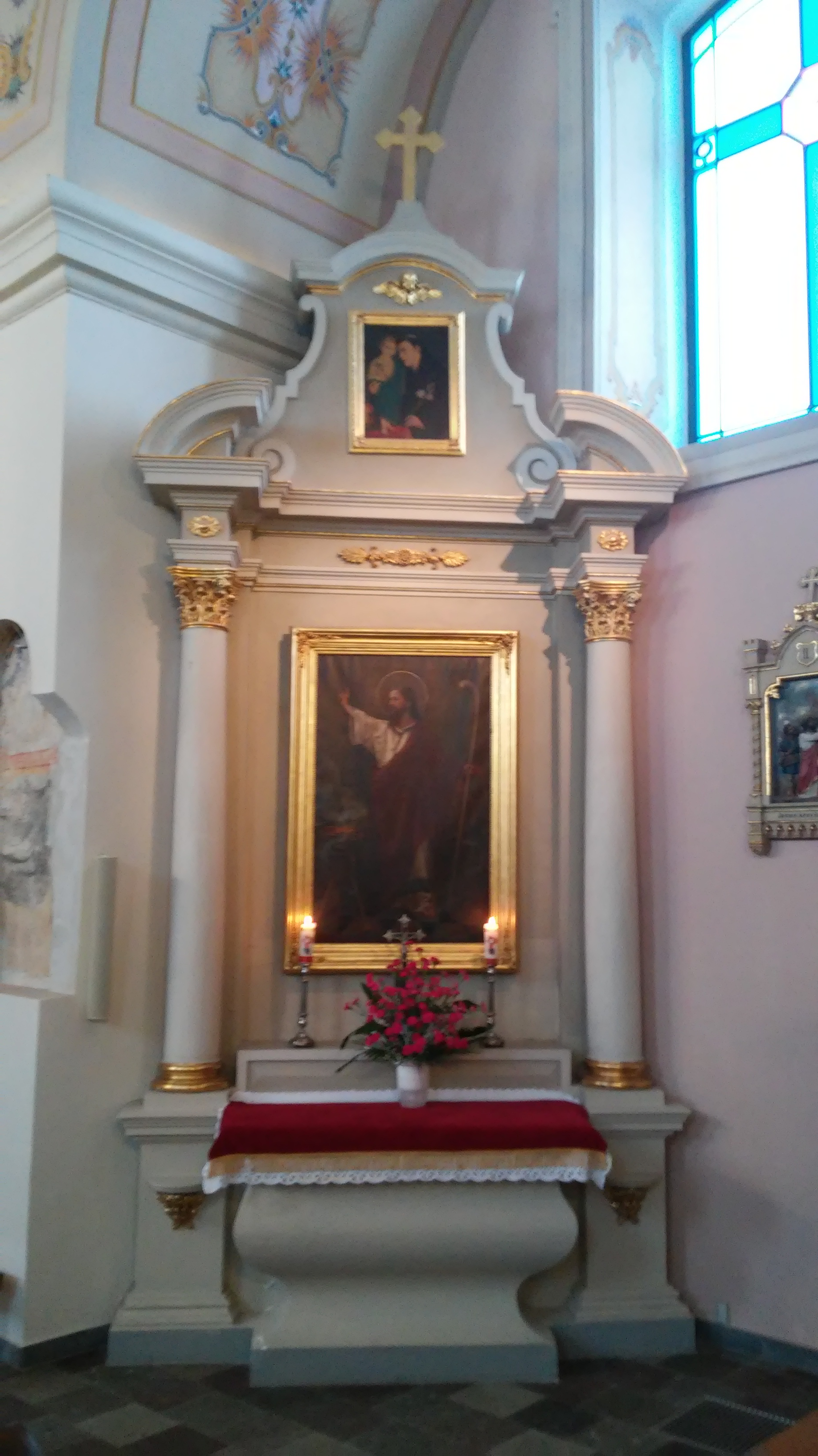 Ołtarz św. Bartłomieja w kolegiacie płockiej